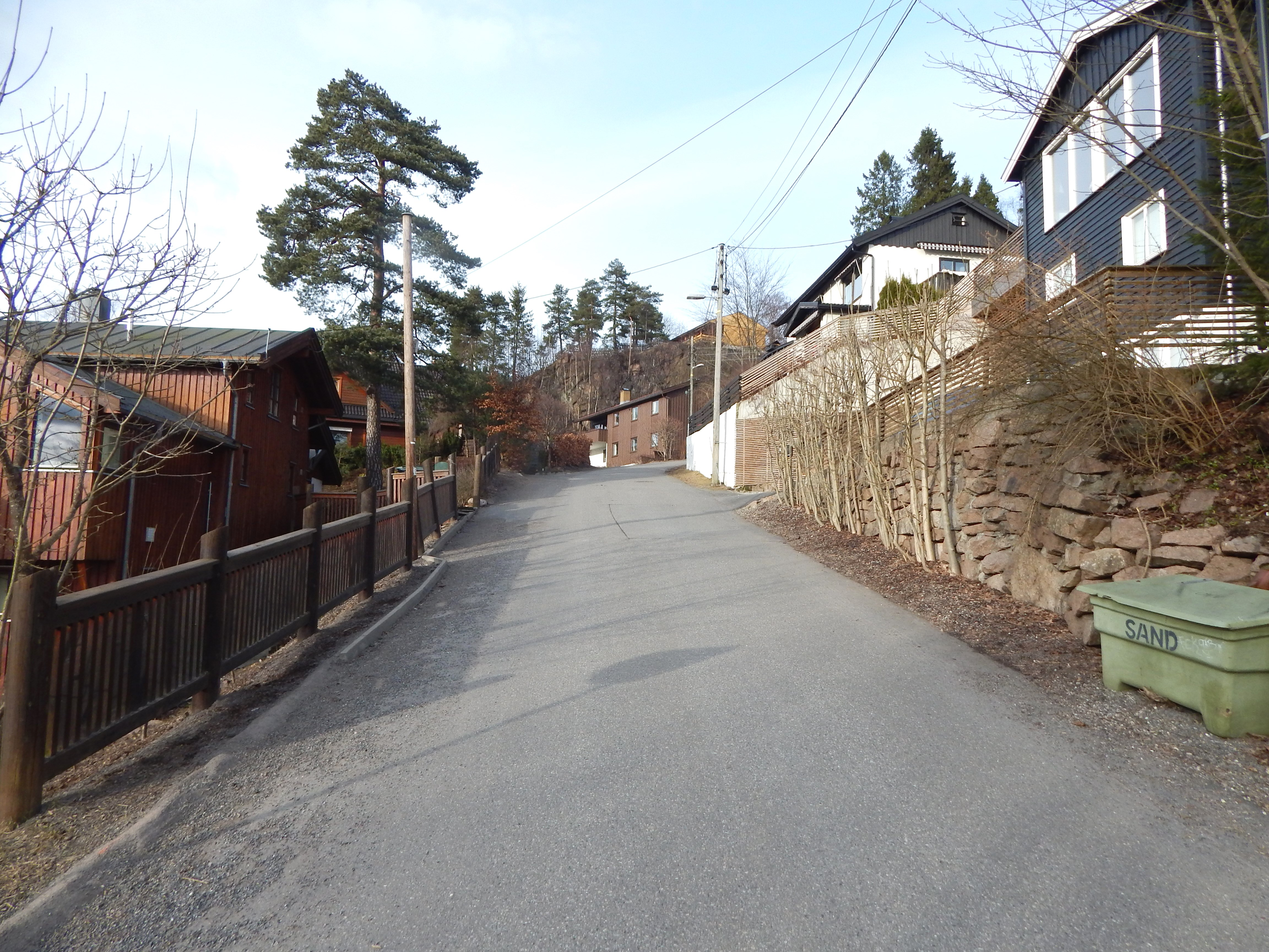 Rønningveien opp fra Myrerveien